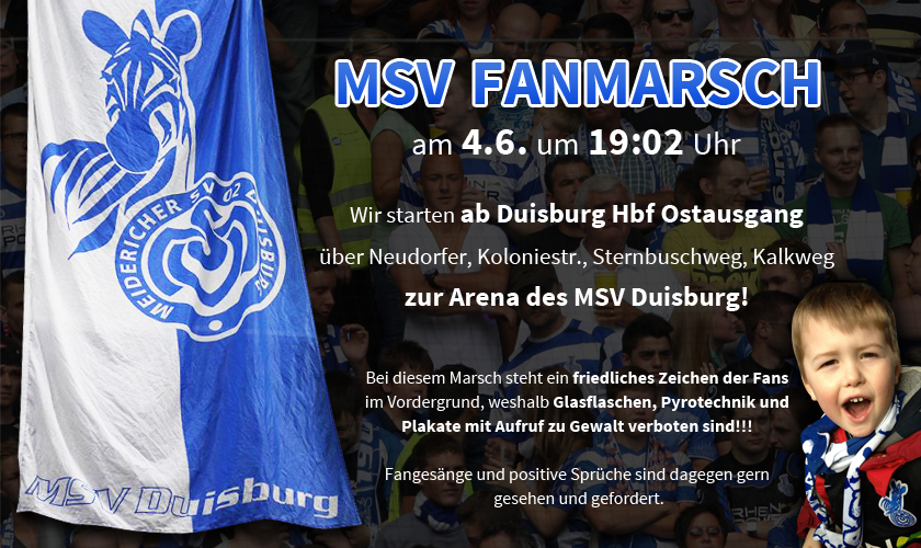 Banner zum Fanmarsch des MSV Duisburg